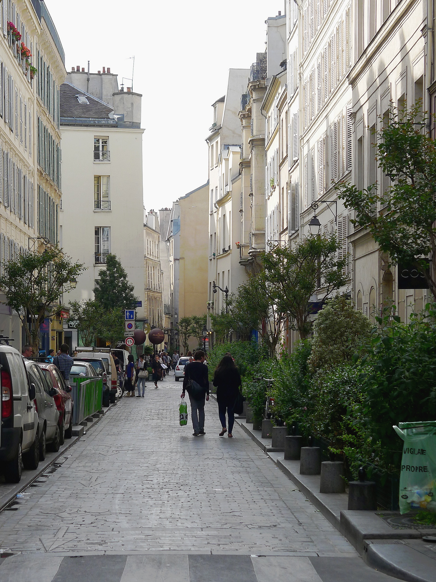 Rue des Rosiers - Paris IV